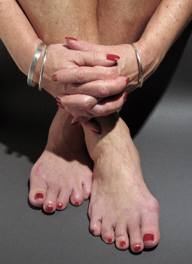 En kvinna med röd nagellack på finger och tånaglar.